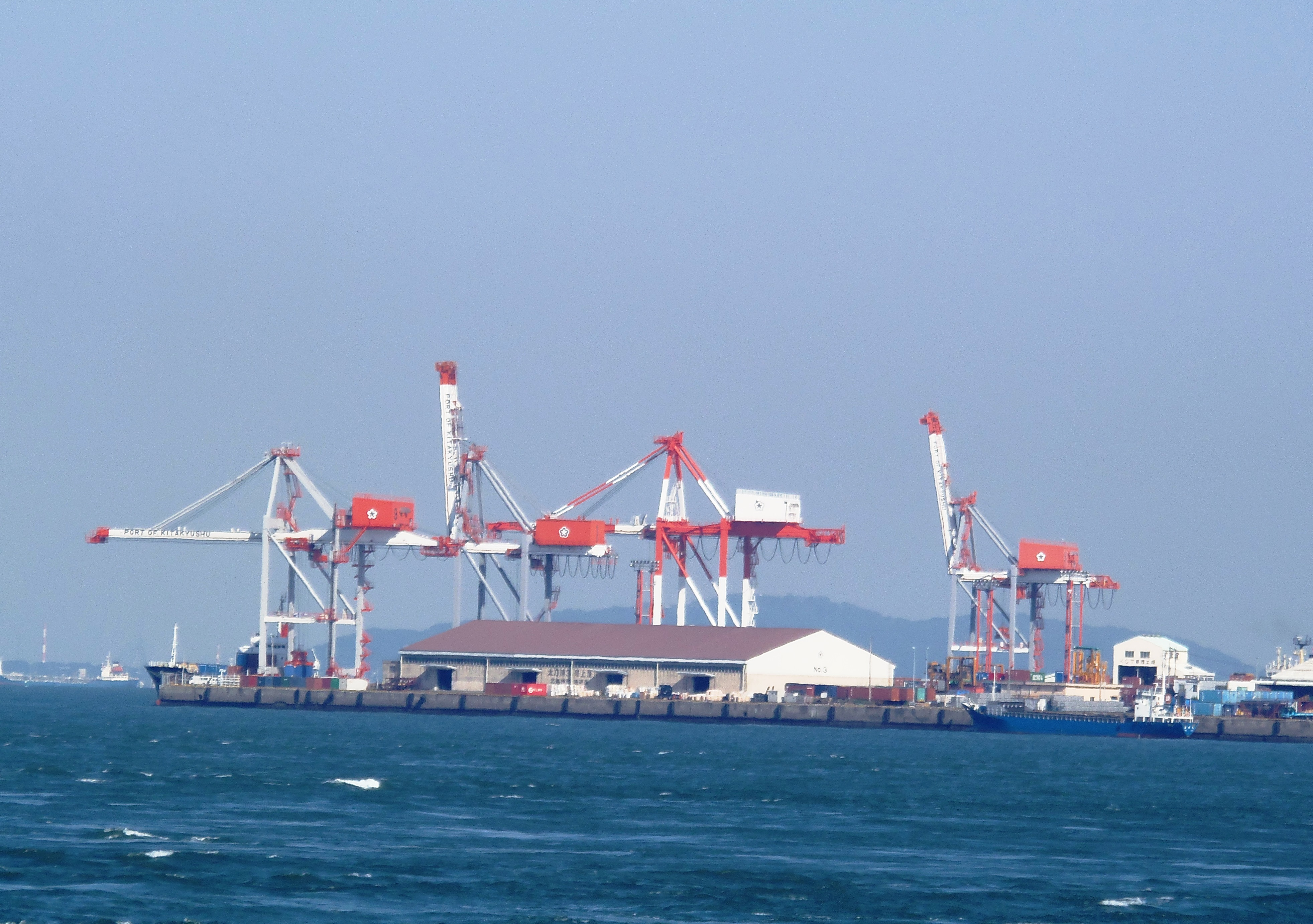 北九州市門司区の太刀浦コンテナターミナルのガントリークレーン